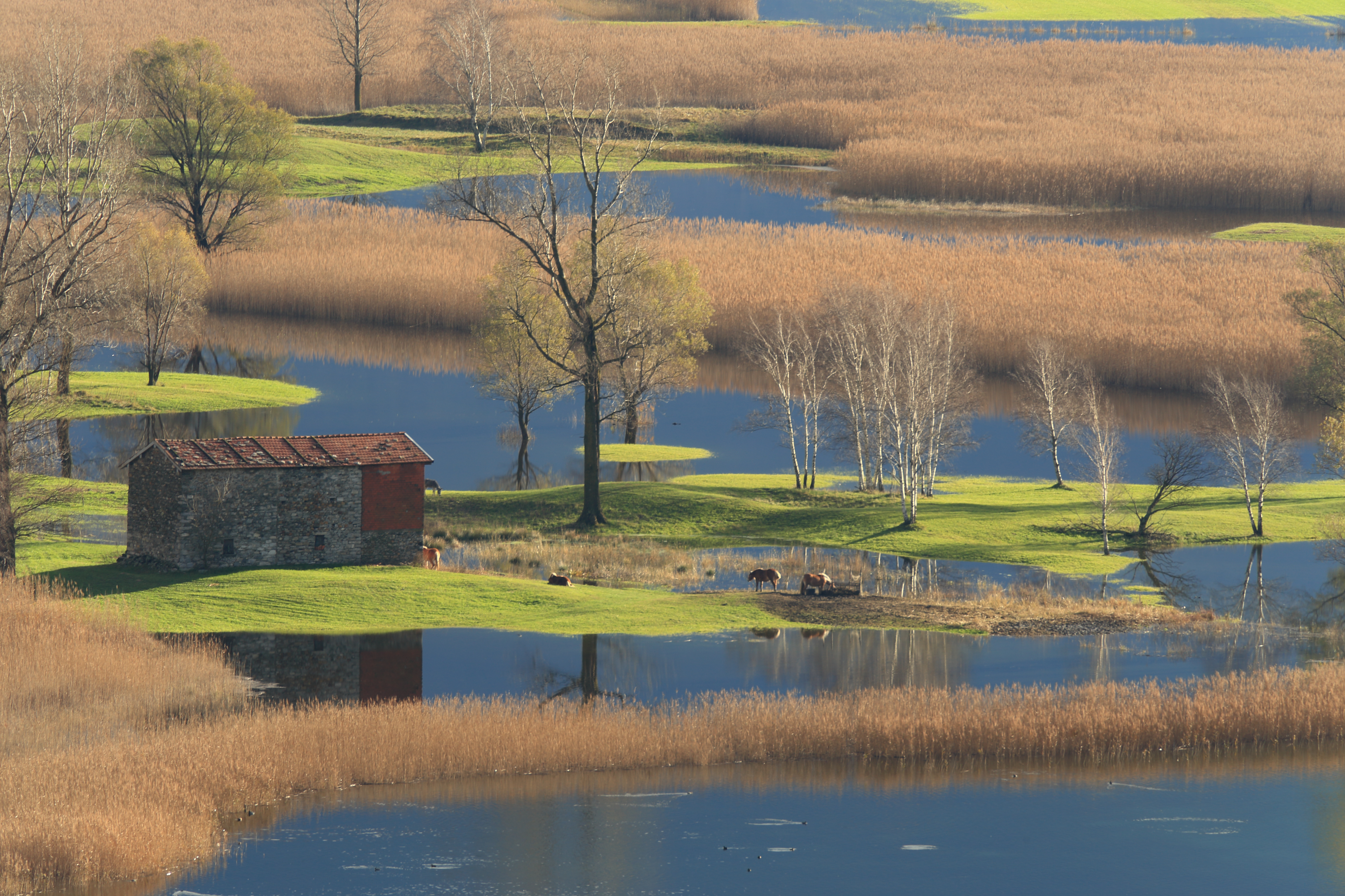 Pian di Spagna e Lago di Mezzola (Q47481130)